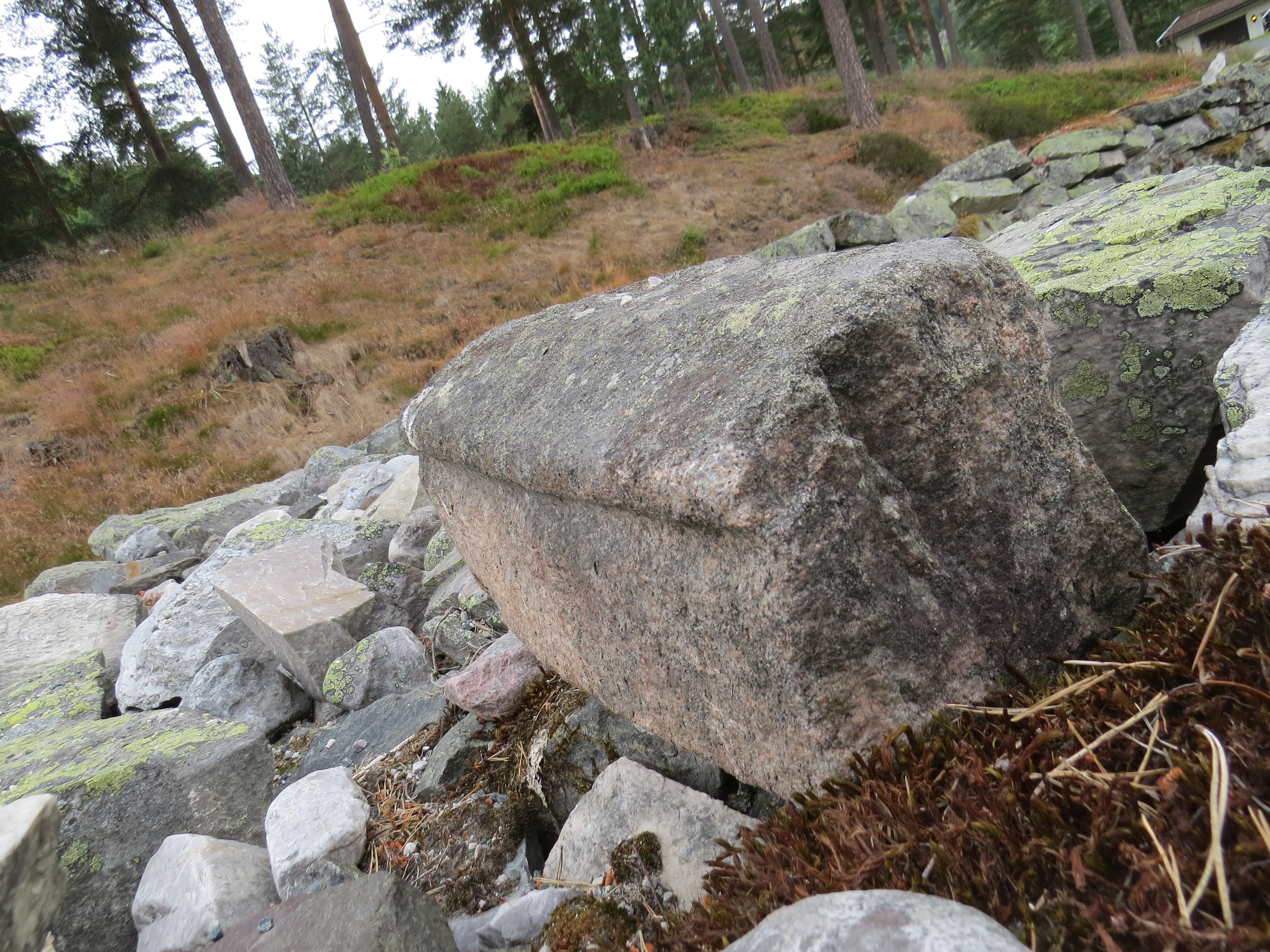 Vederlagssten fra Seljord Kirkes kirkegårdsmur, som kan stamme fra den tidligere Taraldskirke, Telemark